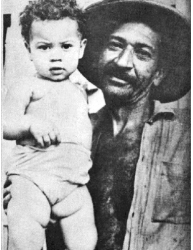 Imagem de Wilson Souza Pinheiro, morto durante a ditadura